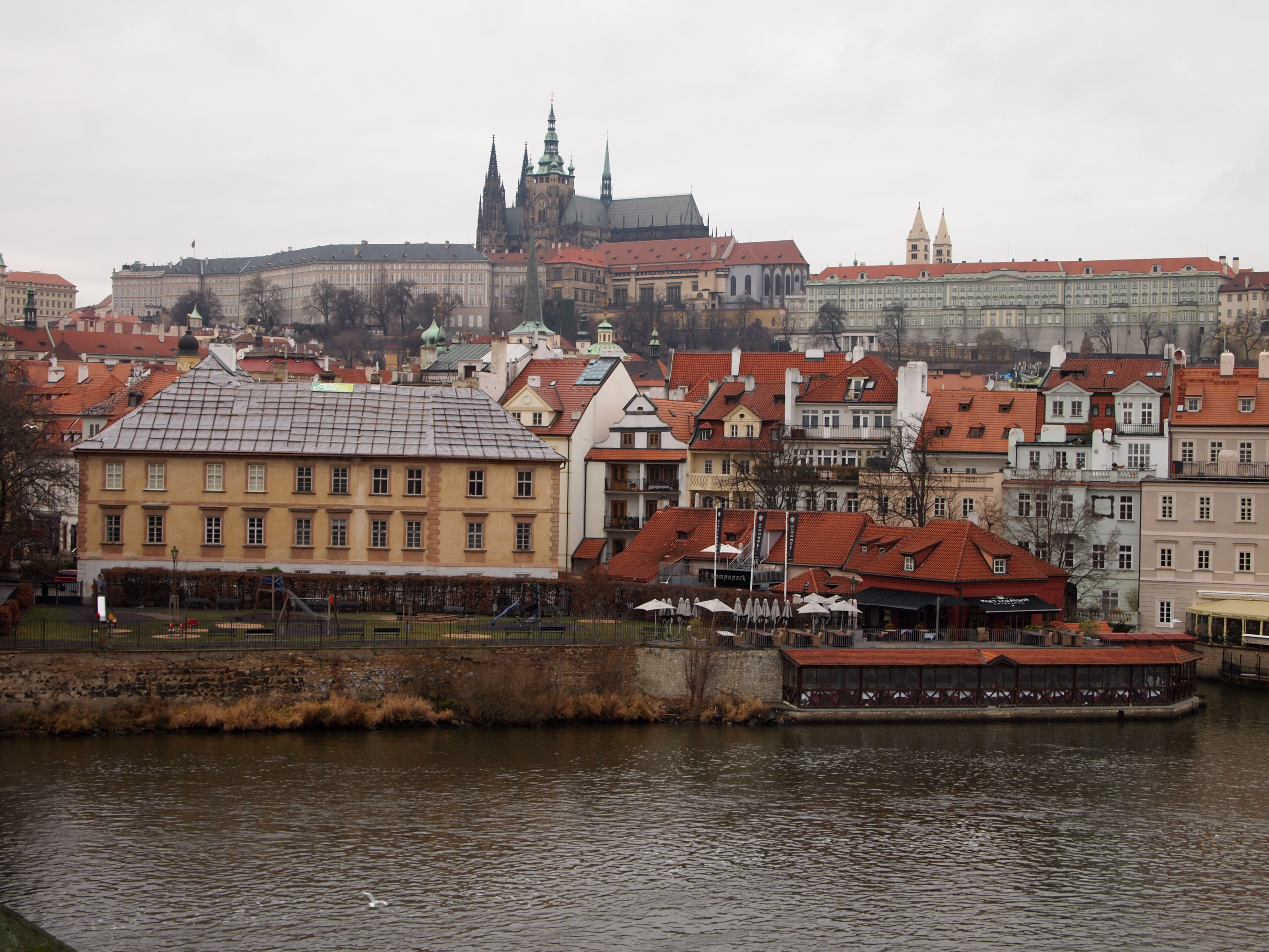 Беларуская (тарашкевіца): Погляд на Праскі Град